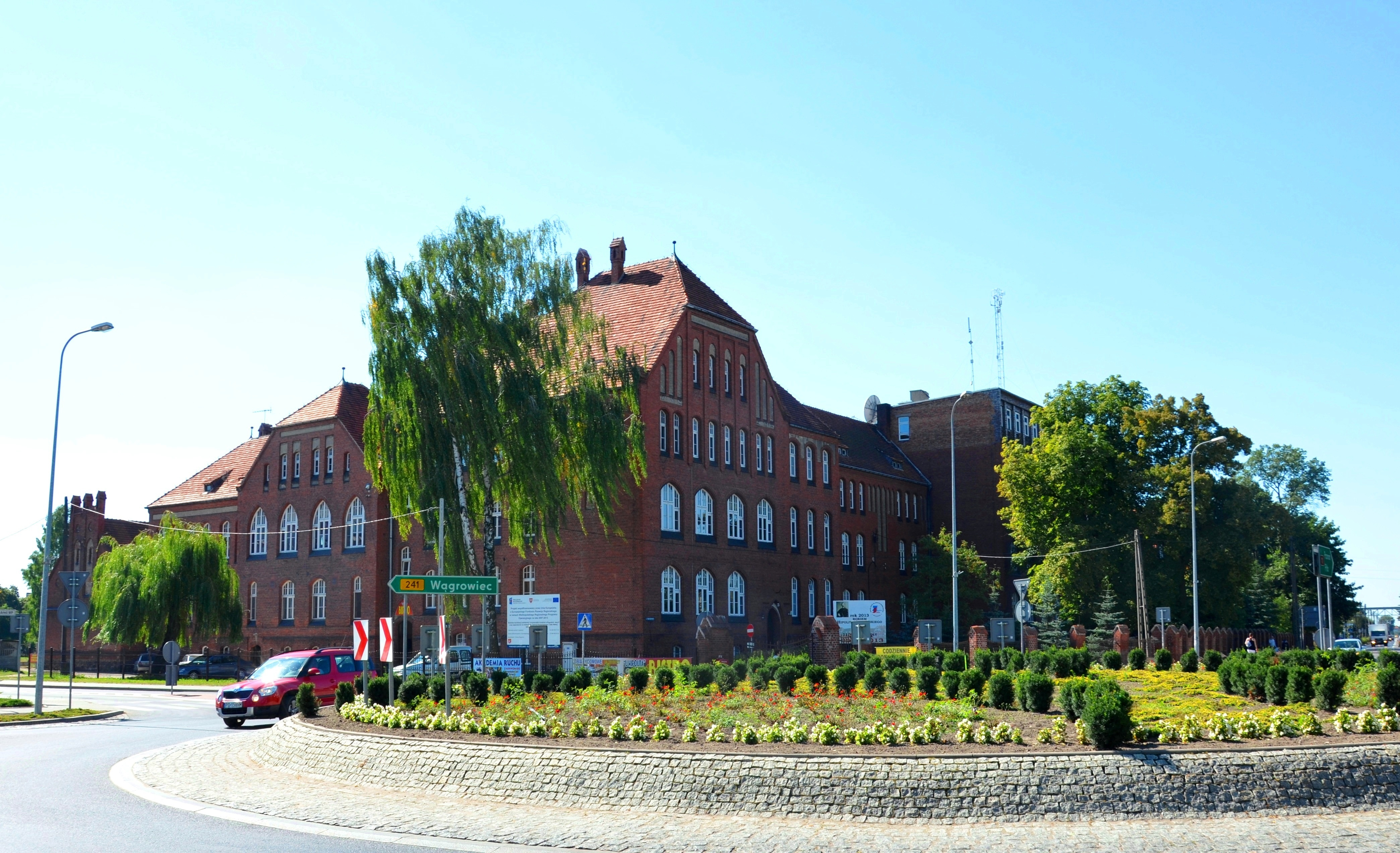 Rogoźno, zespół seminarium nauczycielskiego, ob. zespół szkół